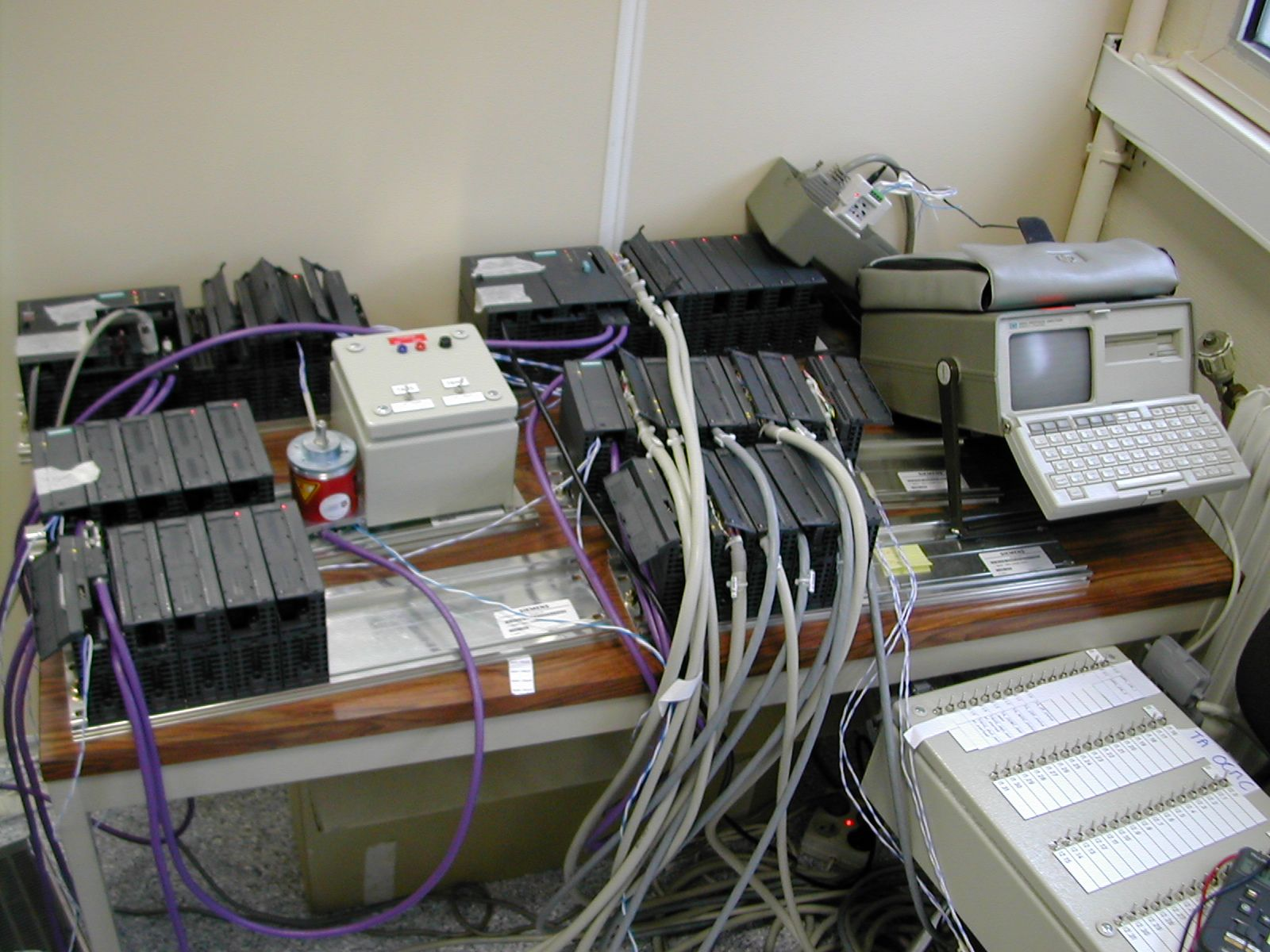 deux automates siemens reliés via MPI avec ses modules entrées-sorties(TOR, ana, rapide) & de communication déportés via profibus codeur analyseur de trame boitier de simulation des entrées-sorties TOR & analogiques